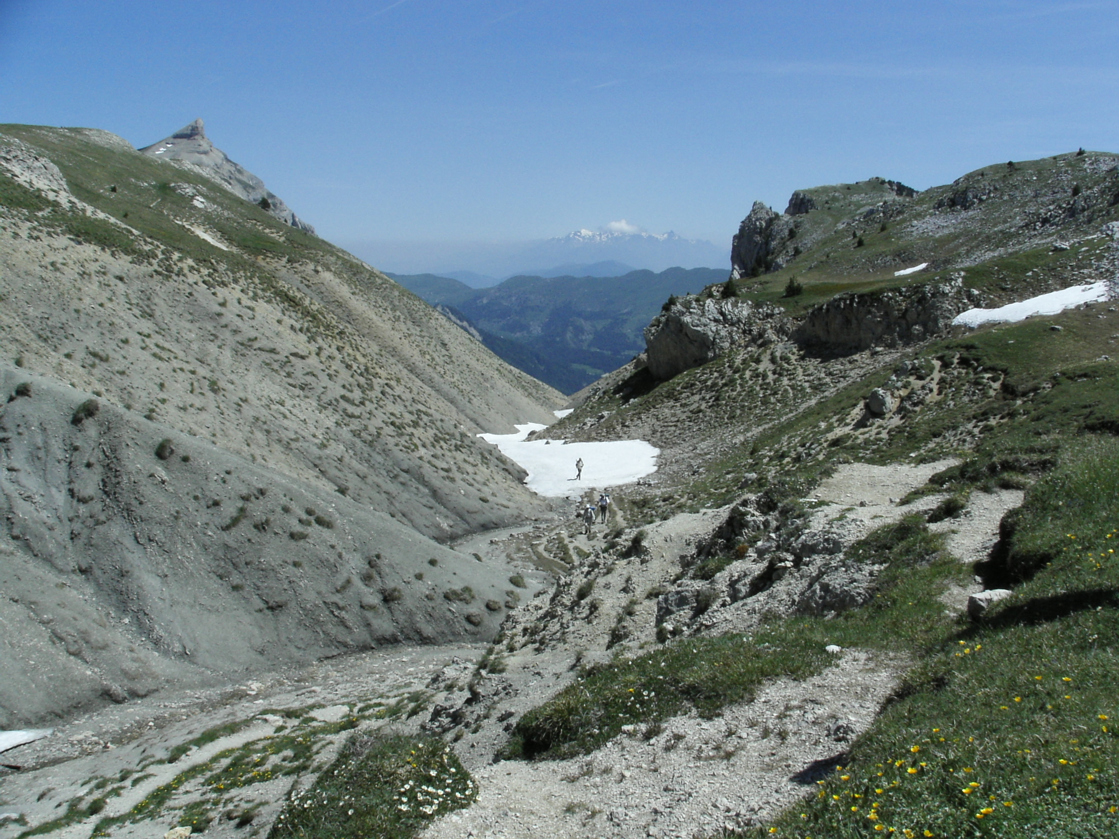 Pas de Bachassons, Hauts Plateaux du Vercors, France